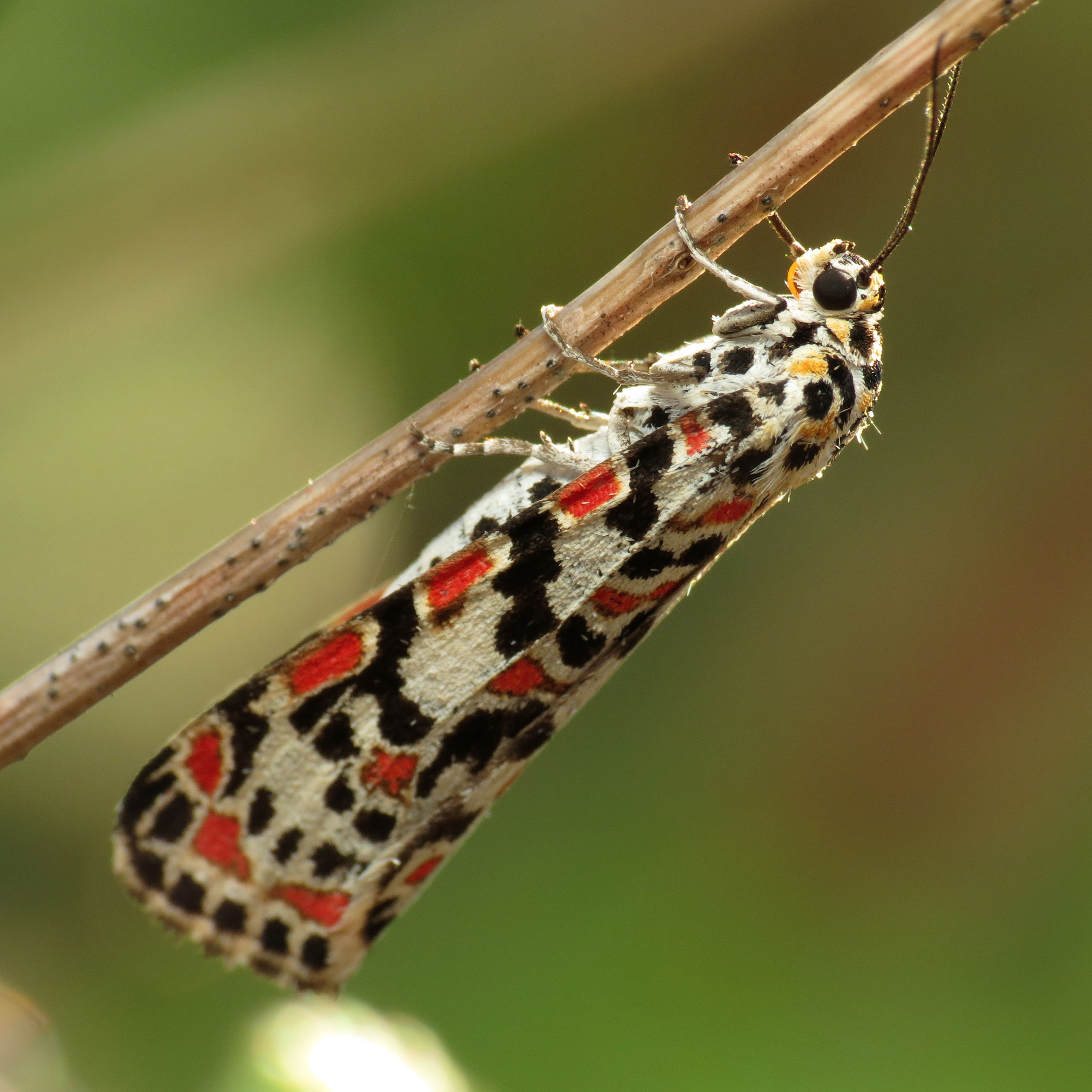 Utetheisa pulchella. Els Poblets, Alicante, Spain